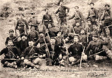 Четата на Ташко Костов Салашки от отряда на Никола Лефтеров на Македоно-одринското опълчение.